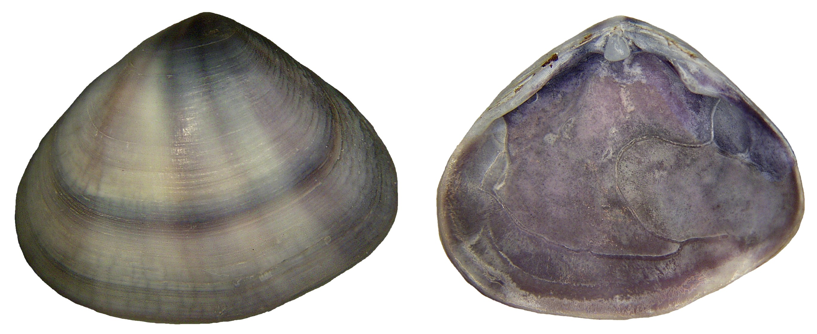 Familie: Donacidae Grösse: 4 cm Verbreitung: Indopazifik Fundort: Kenia, Diani-Beach leg.det. U.Schmidt, 1990 Foto: U.Schmidt, 2008